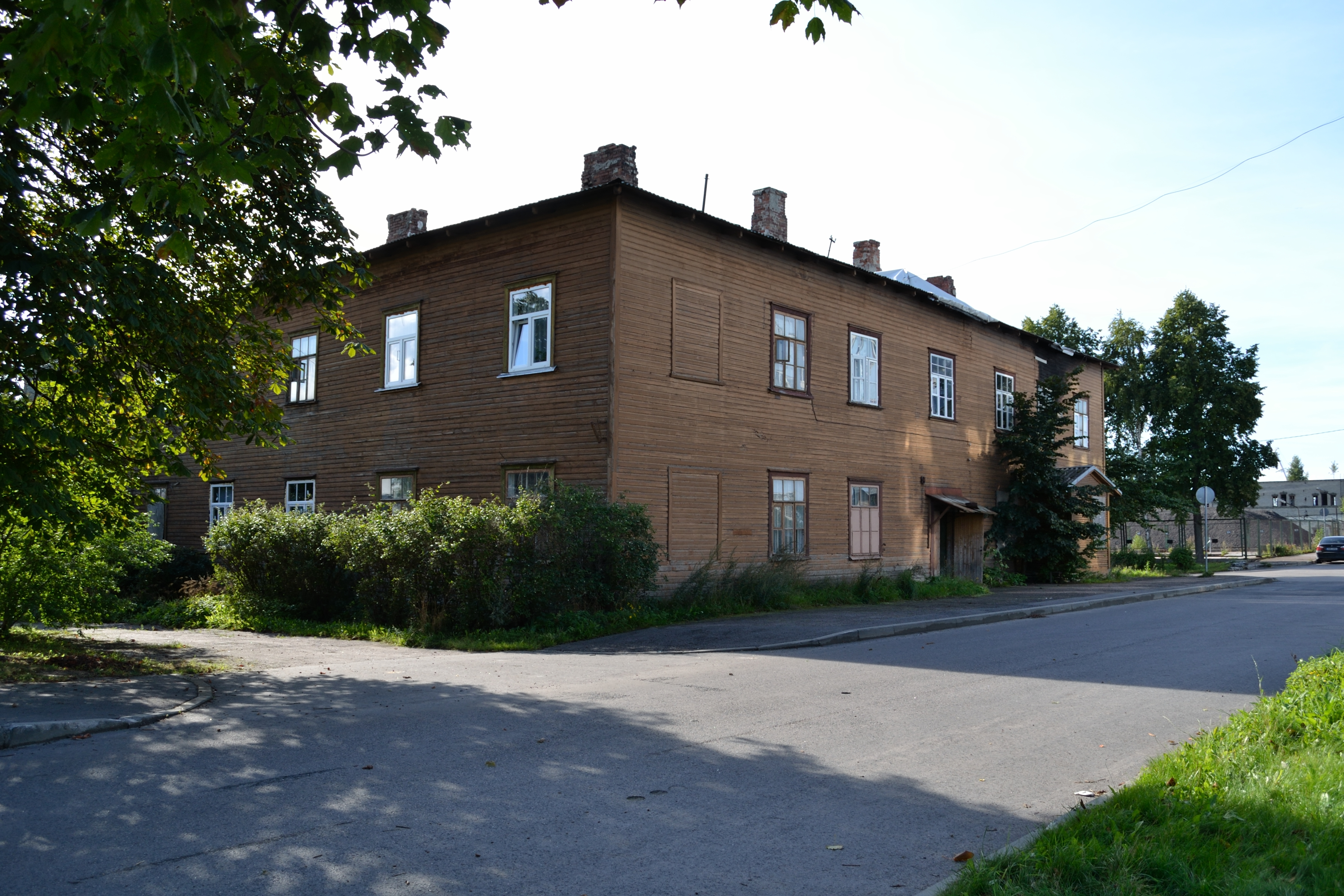 Tallinn, Bekkeri laevatehase tööliskasarmu, 1914